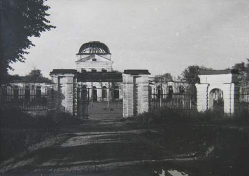 Беларуская (тарашкевіца): Шчорсы (Ščorsy), сядзіба Храптовічаў (Chraptovič). Брама